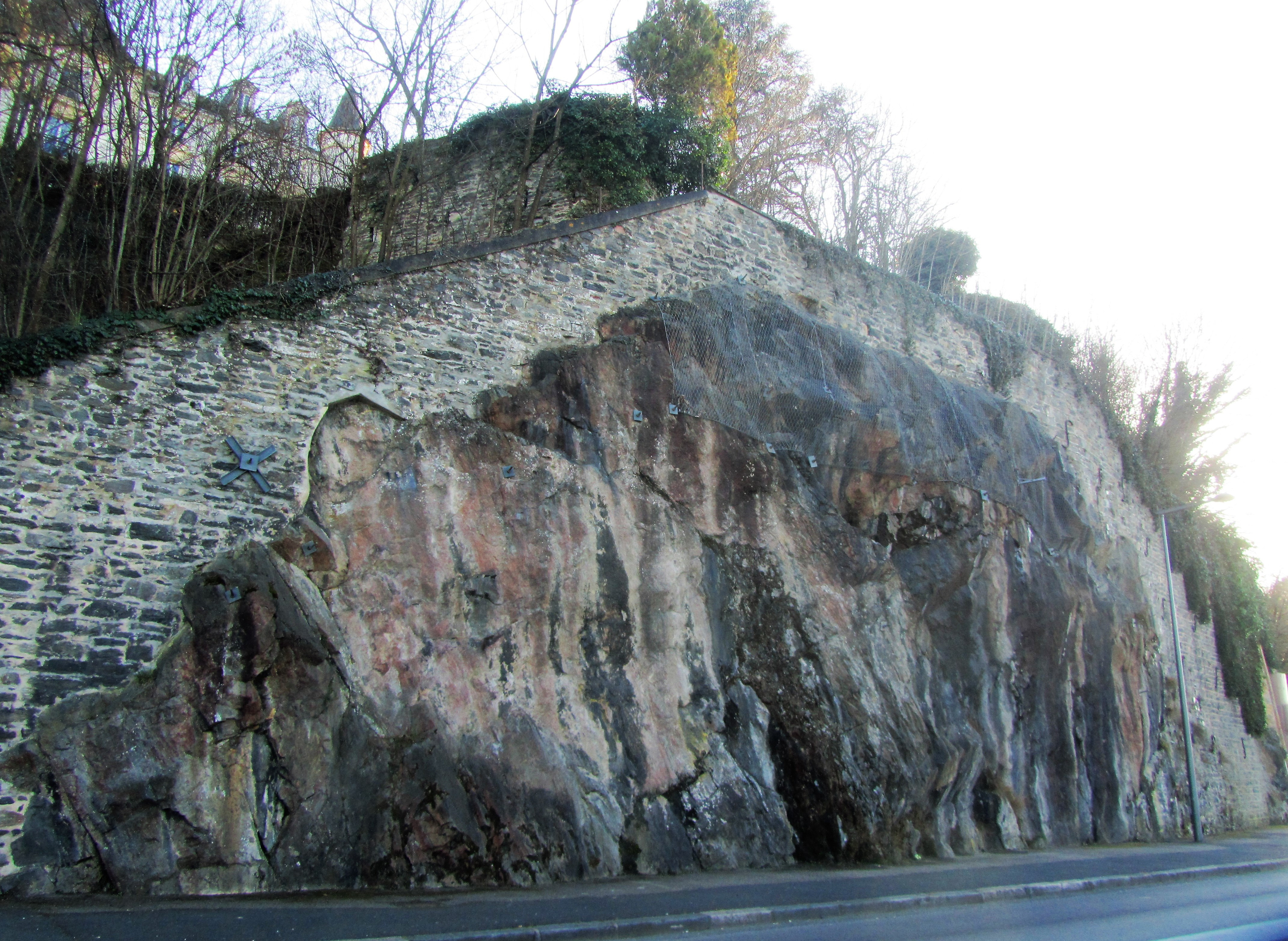 Cette falaise a été taillée dans le gneiss en rive gauche de la Saône à hauteur de l'île Barbe